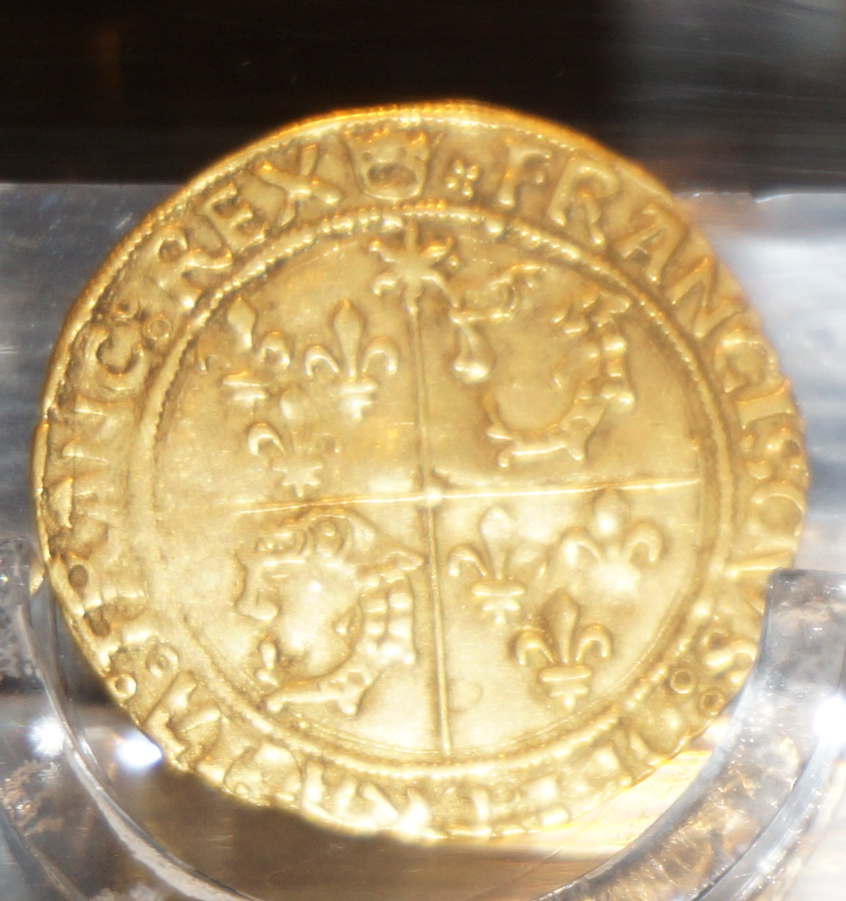 présenté au Musée de l'Ardenne.